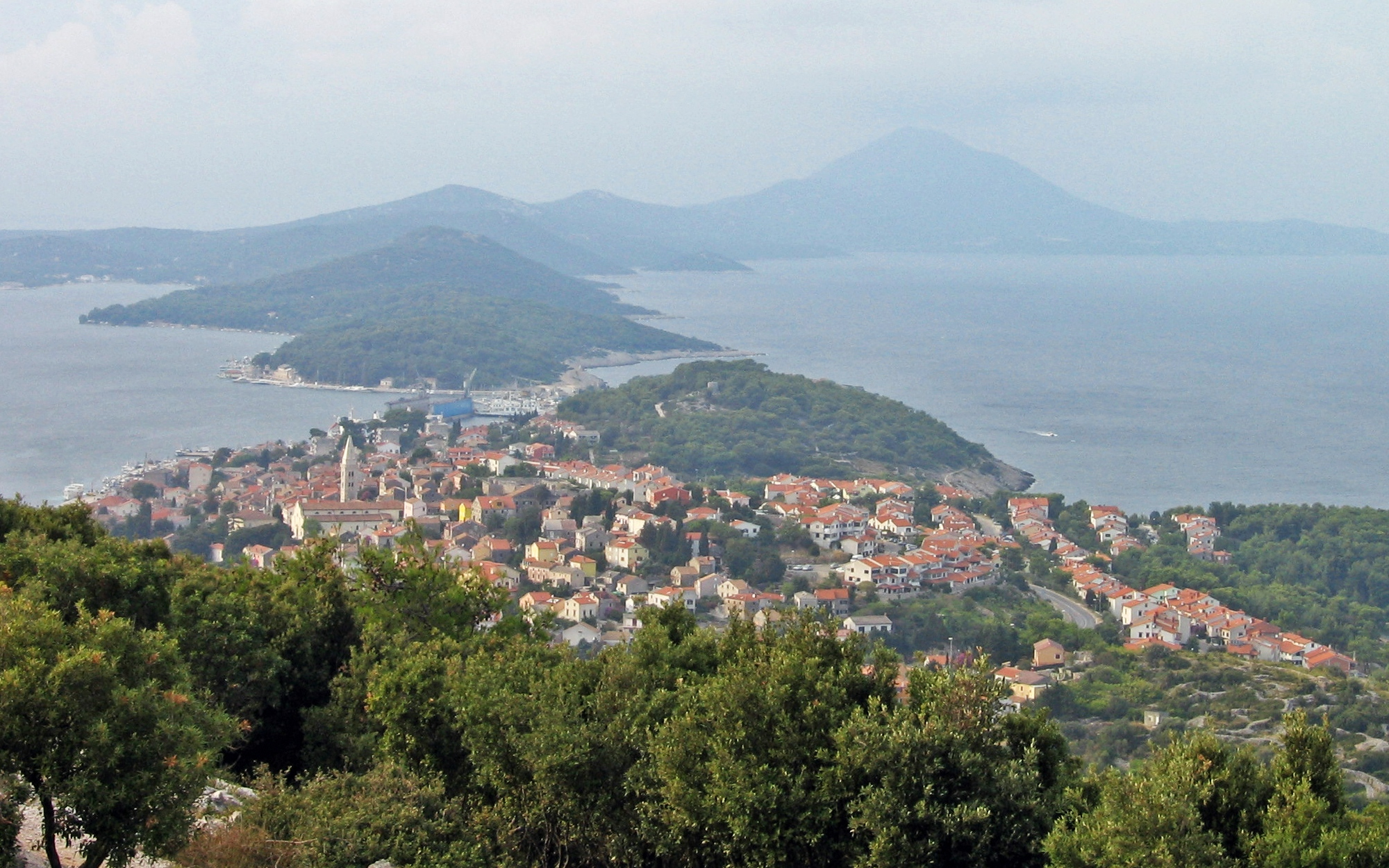 Pohled na město Mali Lošinj na ostrově Lošinj. V pozadí vrchol Televrina (588 m n. m.)